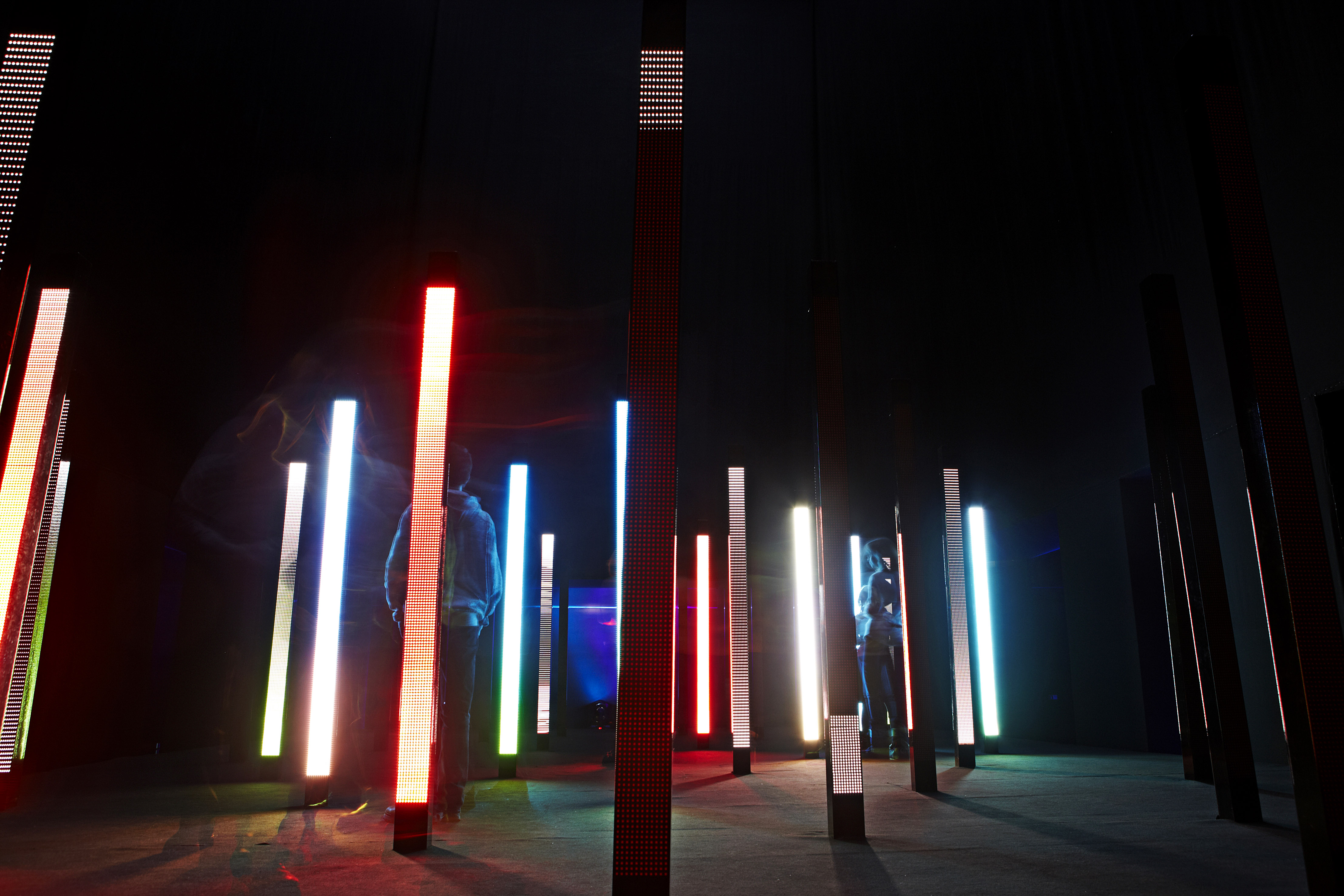 Фестиваль Yota Space 2010 - United Visual Artists - инсталляция Volume